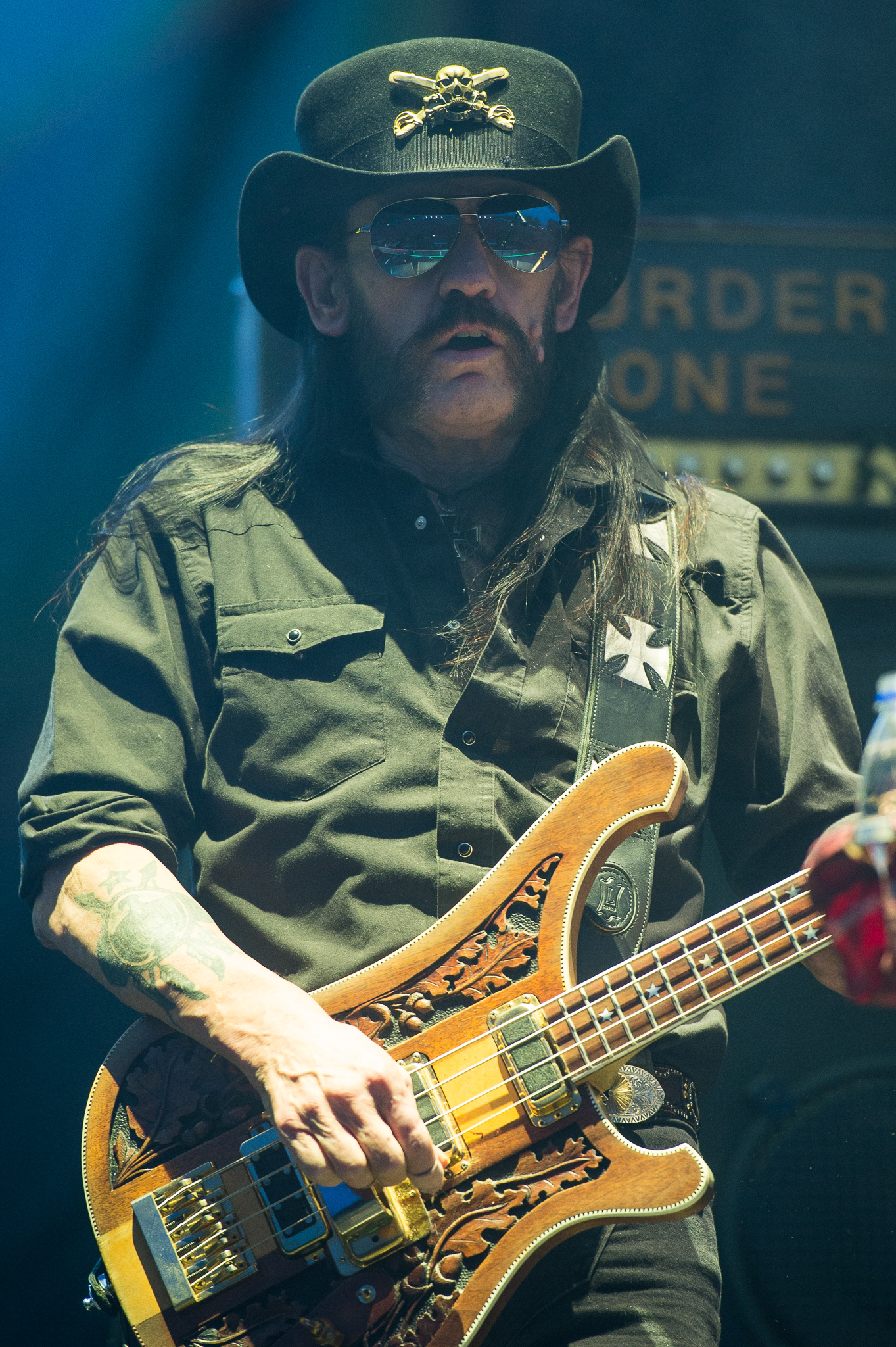 ARGO-Konzerte,Beck's Park Stage,Festival,Ian Fraser „Lemmy“ Kilmister,Konzert,Lemmy Kilmister,Livekonzert,Livemusik,Motörhead,Musik,RiP,Rock im Park 2015